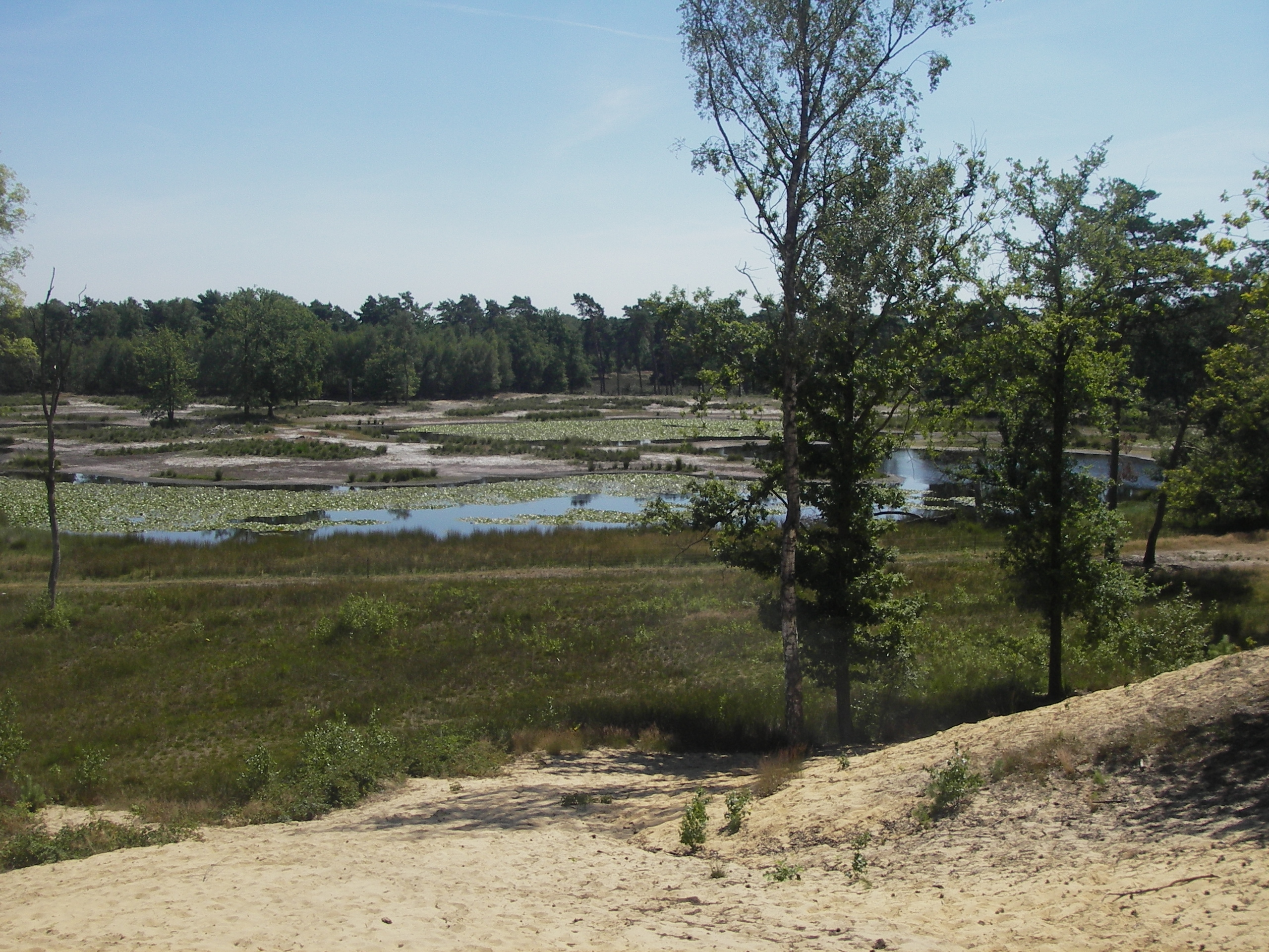 Ven en stuifzand in de Ravenvennen bij Lomm, niet ver van Venlo.